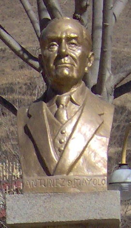 Monumento de Santiago Antúnez de Mayolo, ingeniero, físico y matemático peruano en el Parque Ecológico Infantil Chalampampa